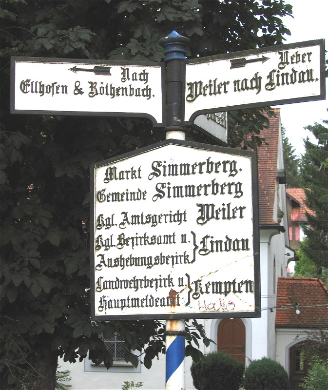 Historische Ortstafel in Simmerberg im Allgaeu